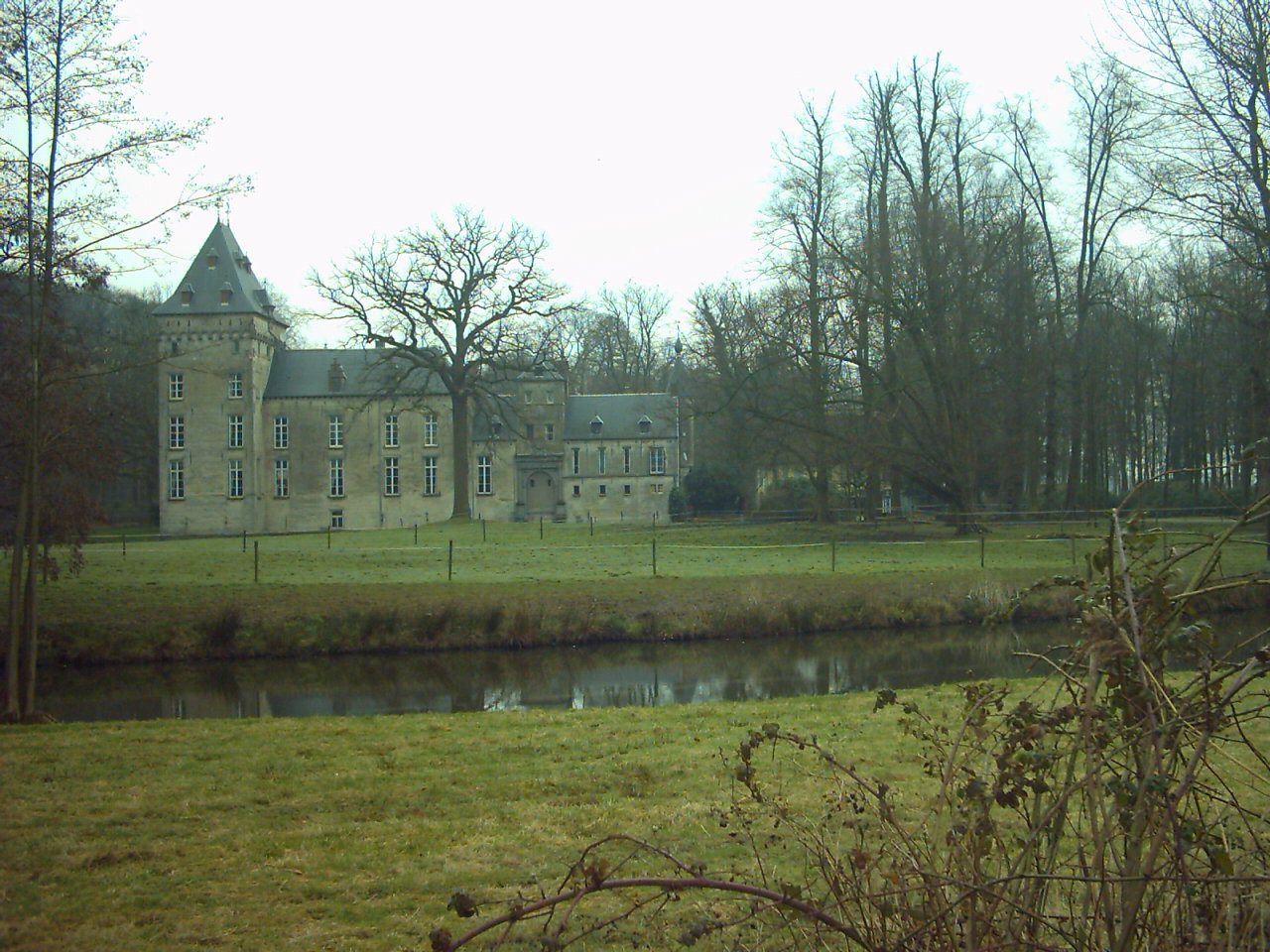 Kasteel van Westmalle. Hoofdgebouw uit 1561 met toevoegingen uit 1878.